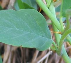 Fotografía de Pablo Alberto Salguero Quiles. Ejemplar de 1,50 metros, Agosto, Arjonilla, Jaén, España. Detalle de la espina axial de la capparis spinosa.